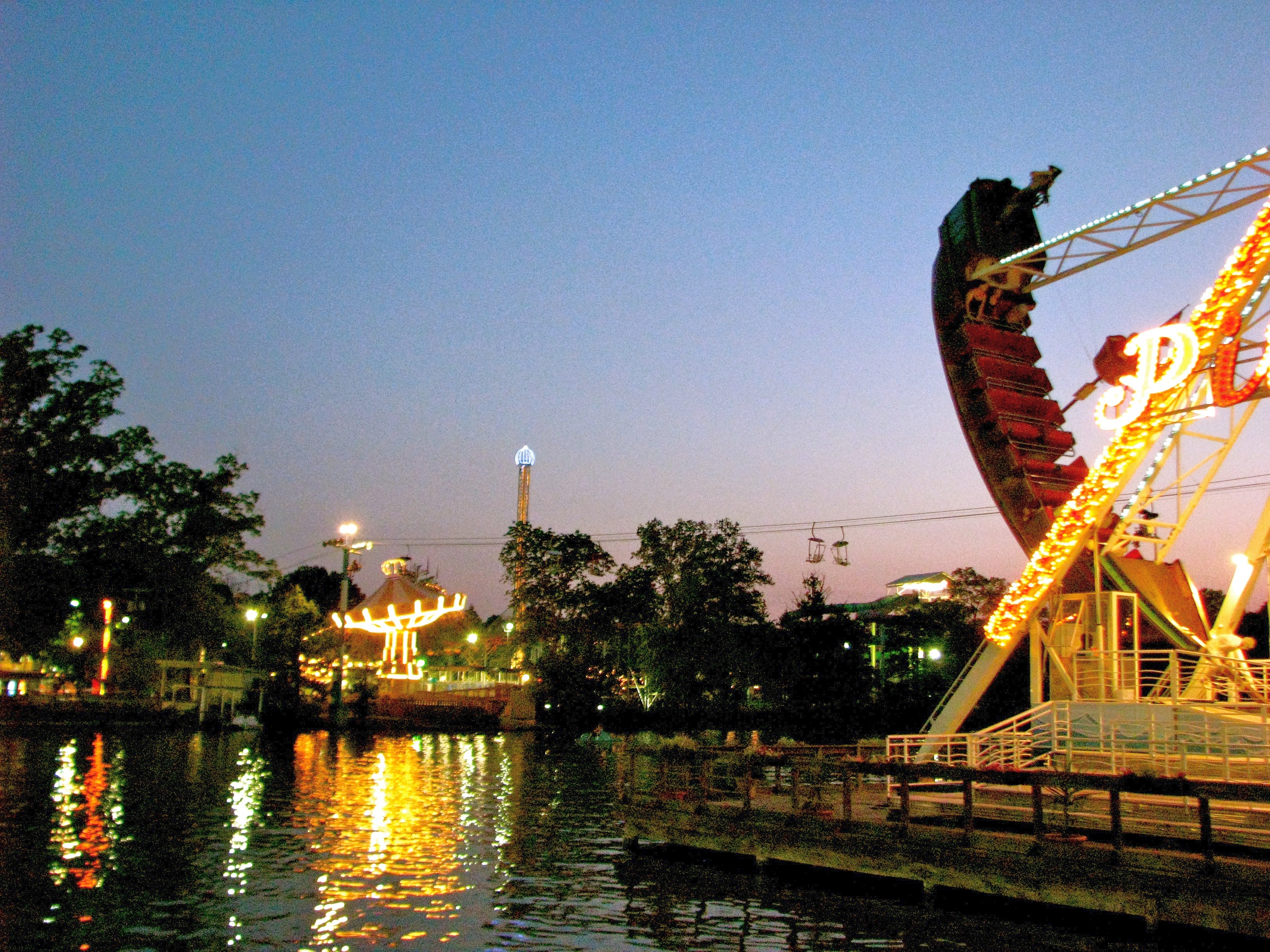 Lake Winnepesaukah Amusement Park, Rossville, Georgia.